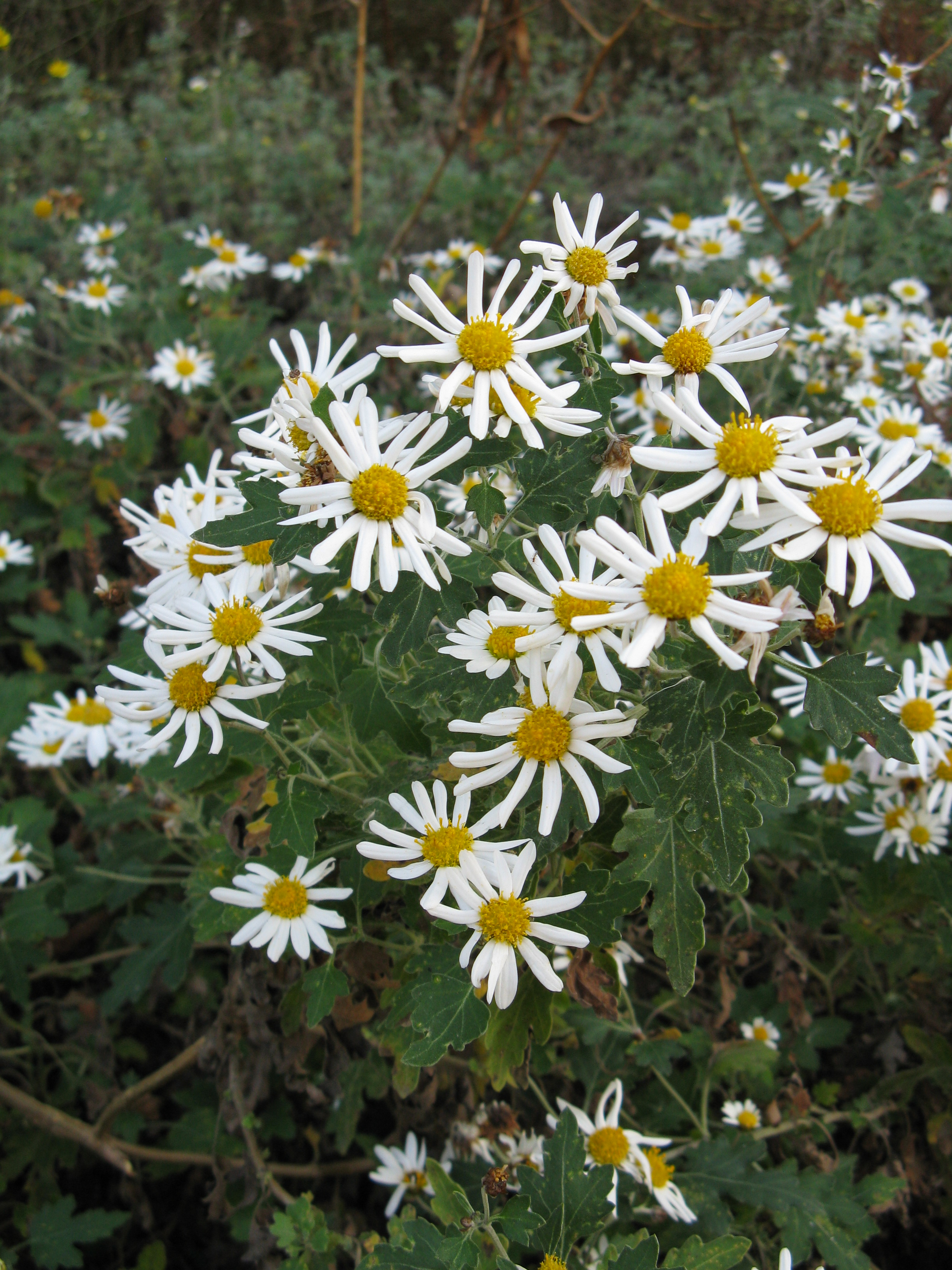 Chrysanthemum japonense Scientific name Chrysanthemum japonense (= Dendranthema japonense = Dendranthema occidentalijaponense)